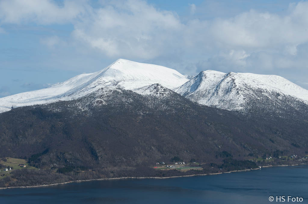 Fotografert i april 2012, fra Rørene på Ellingsøya mot Tverrfjellet